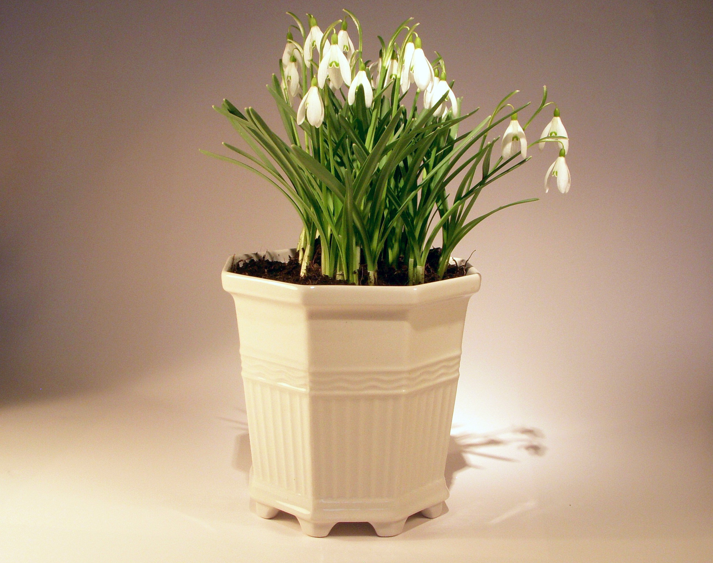 Waldemarsuddekrukan formgiven av Prins Eugen år 1915